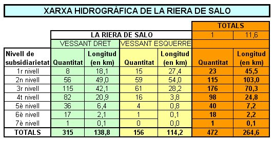 Taula de síntesi de les dades de la xarxa hidrogràfica de la conca de la Riera de Salo.